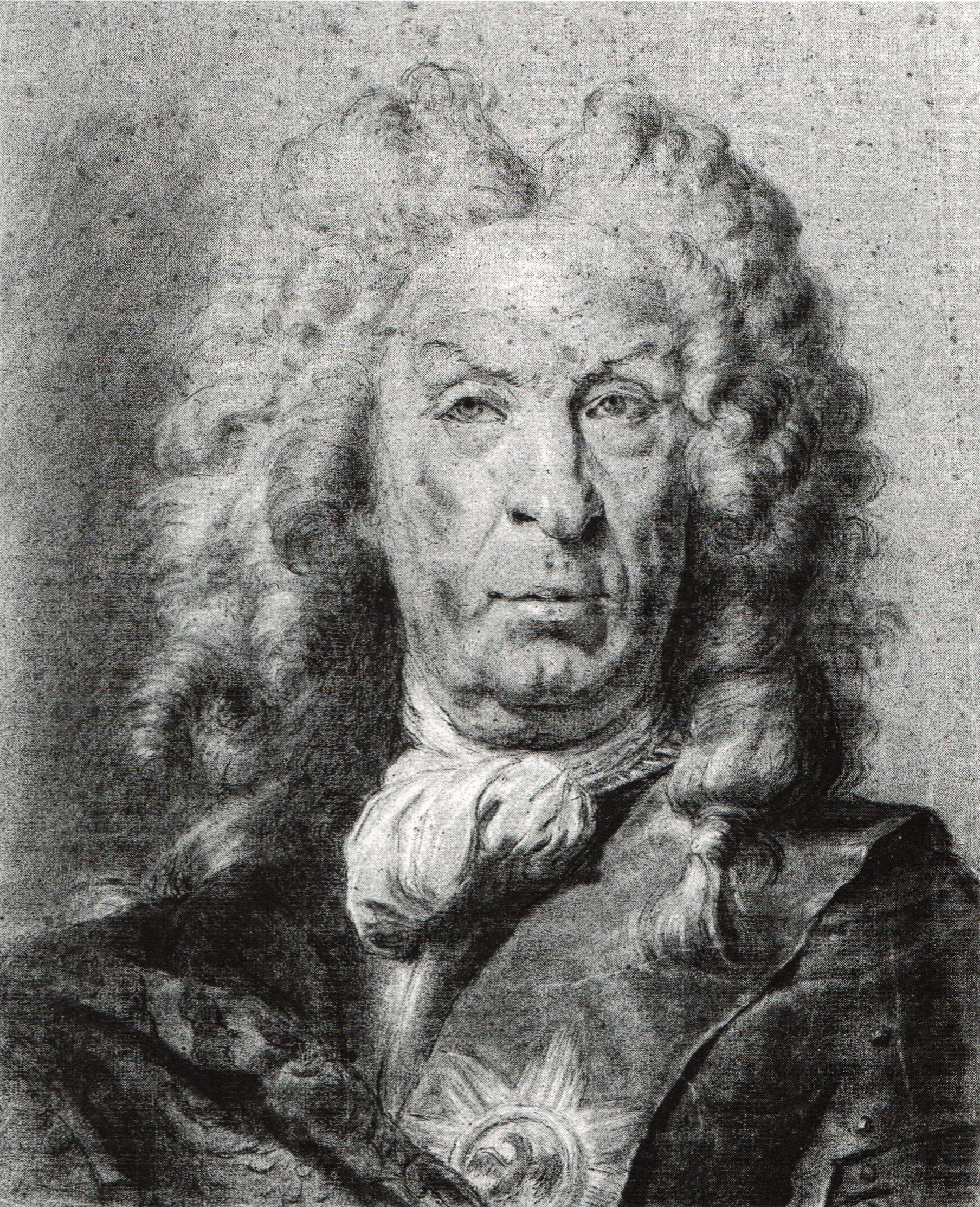 Portrait von Otto von Schwerin.